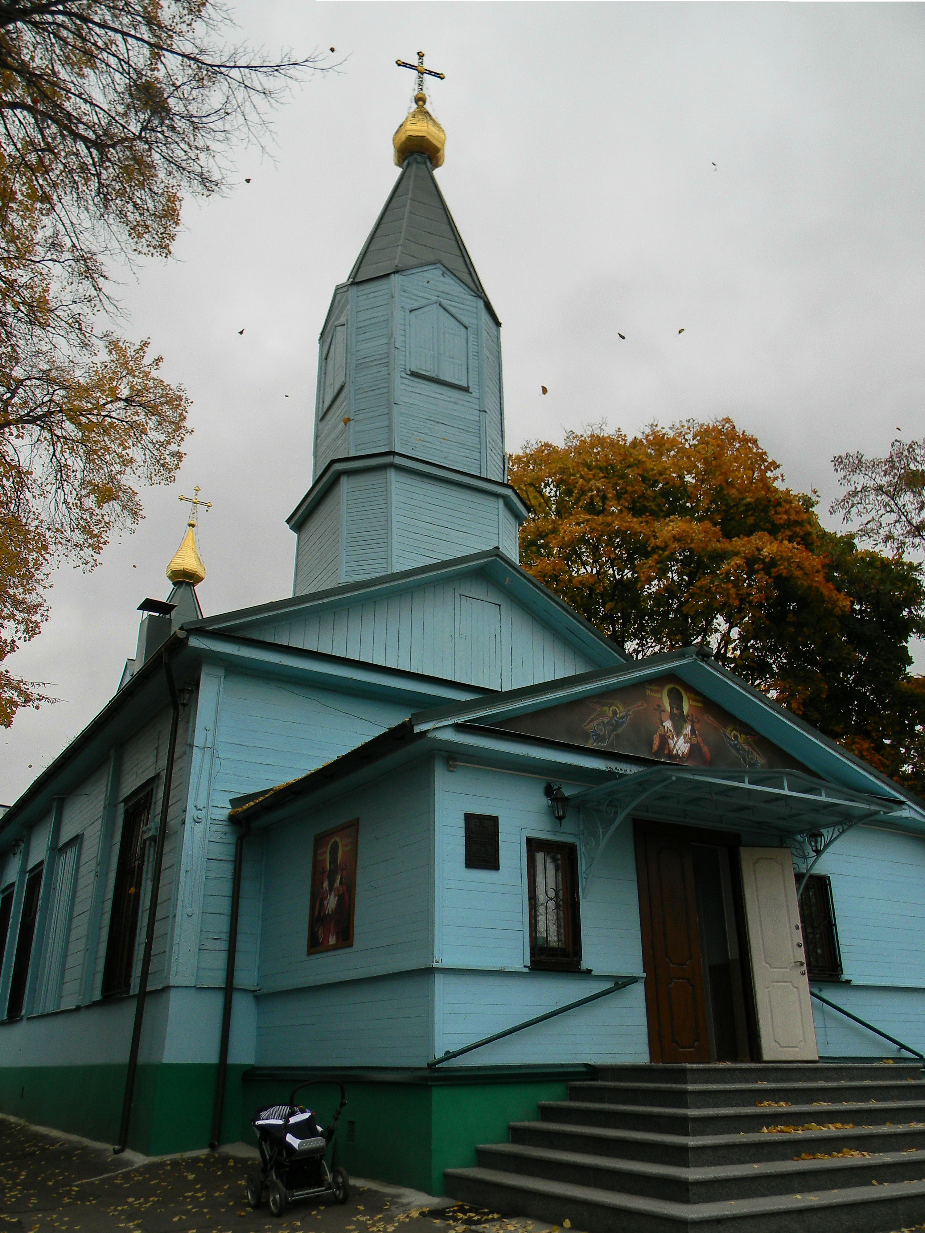 Церква св. Макарія, Київ, Стара Поляна вул., 46